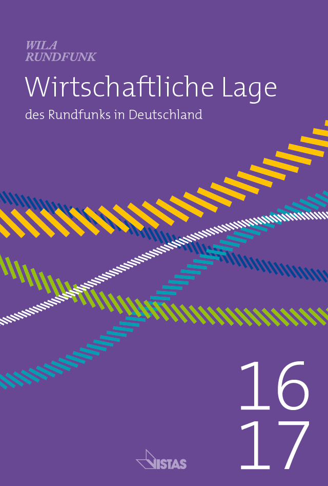 Der Buchtitel zur aktuellen Ausgabe der Studie zur wirtschaftlichen Lage des Rundfunks in Deutschland 2016/2017